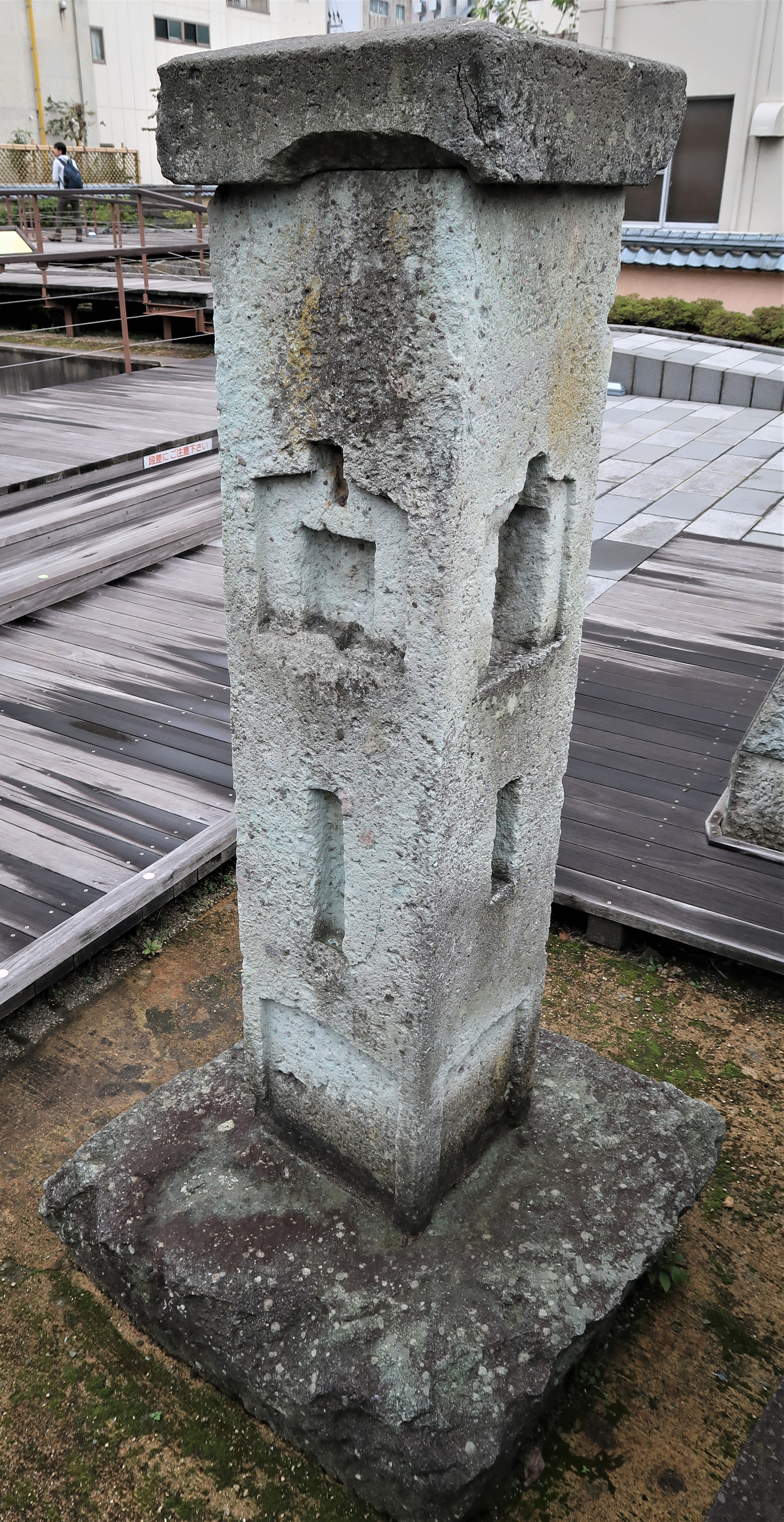 柴田神社にある九十九橋の半石半木時代の橋脚